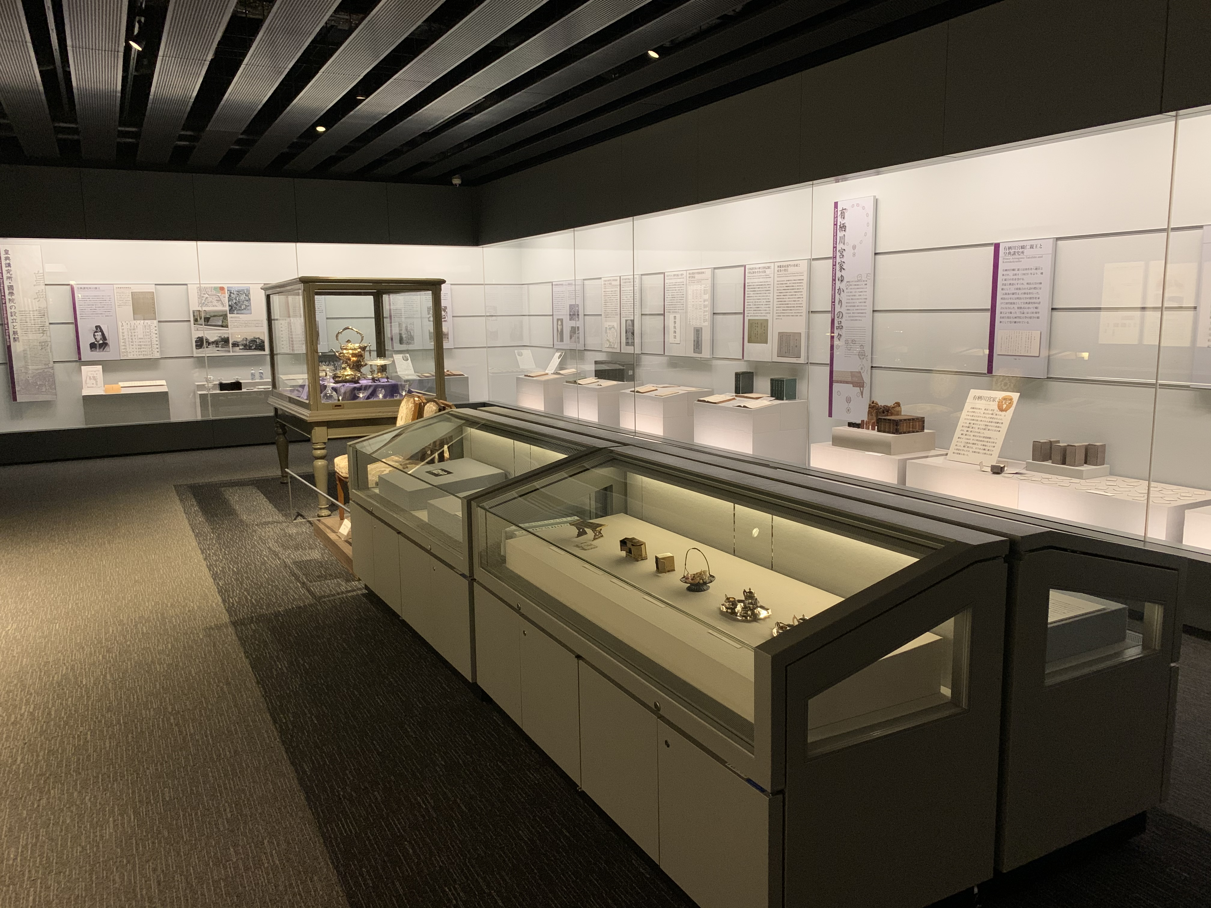 國學院大學博物館の校史展示室の写真